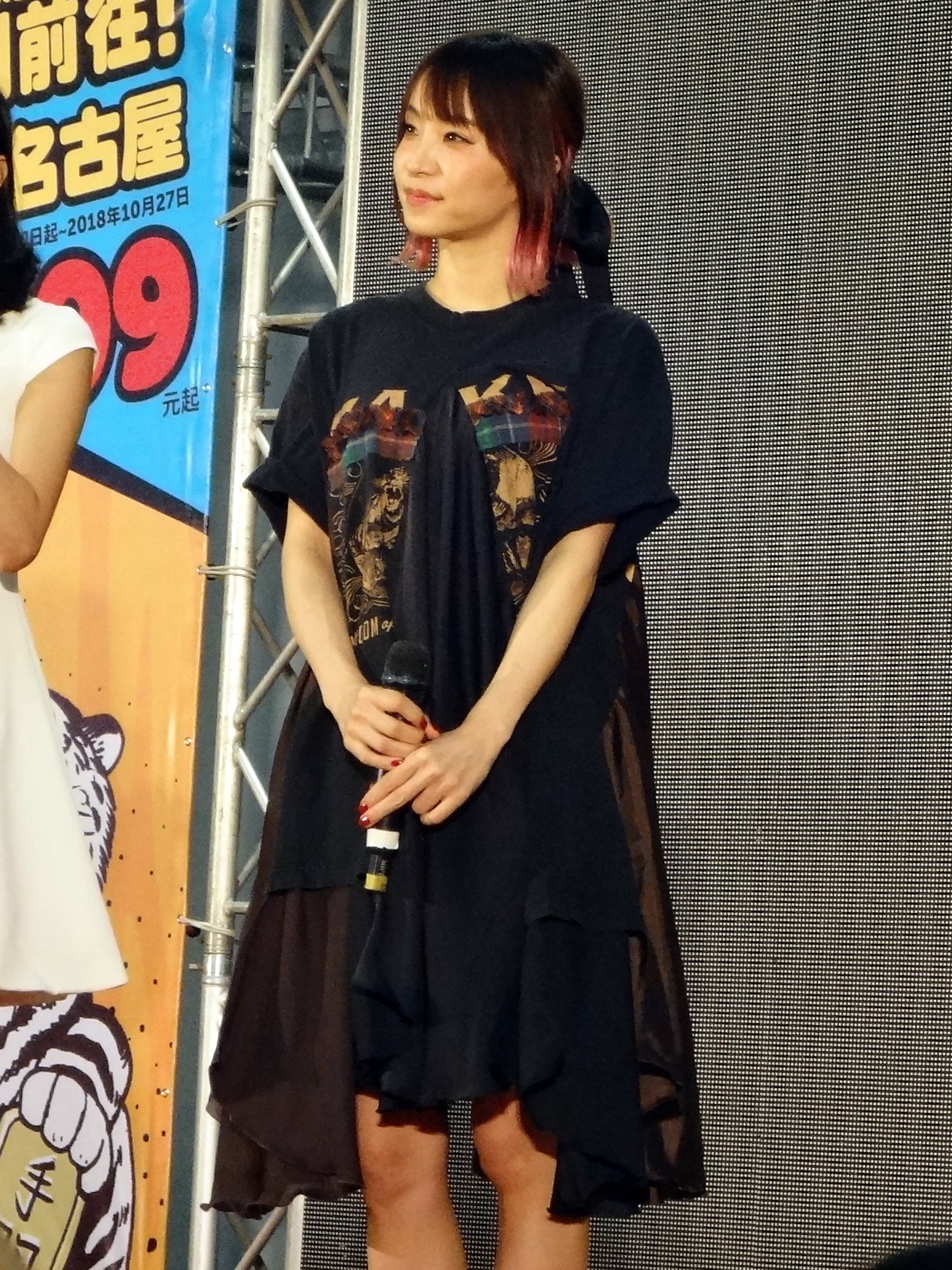 LiSA登上第28屆亞洲動漫創作展舞台。